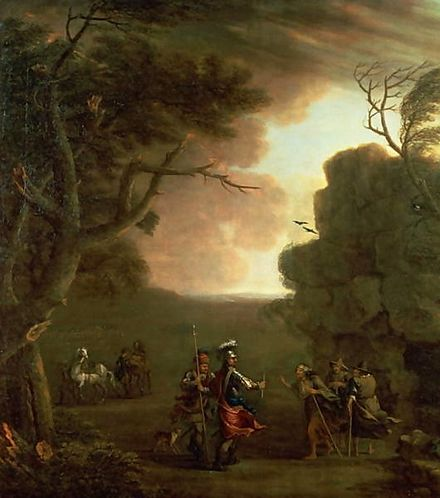 detail